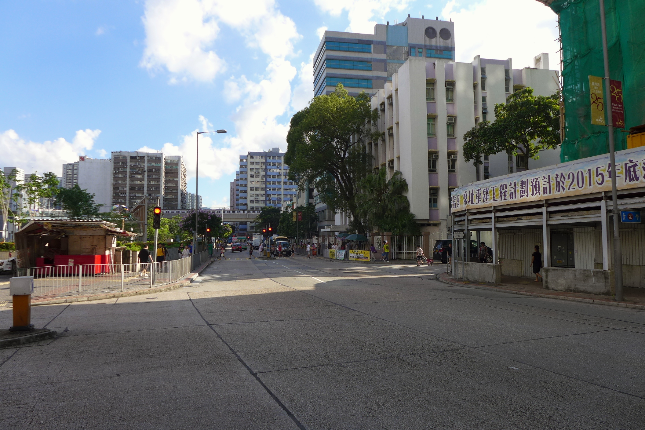 Tsui Ping Street